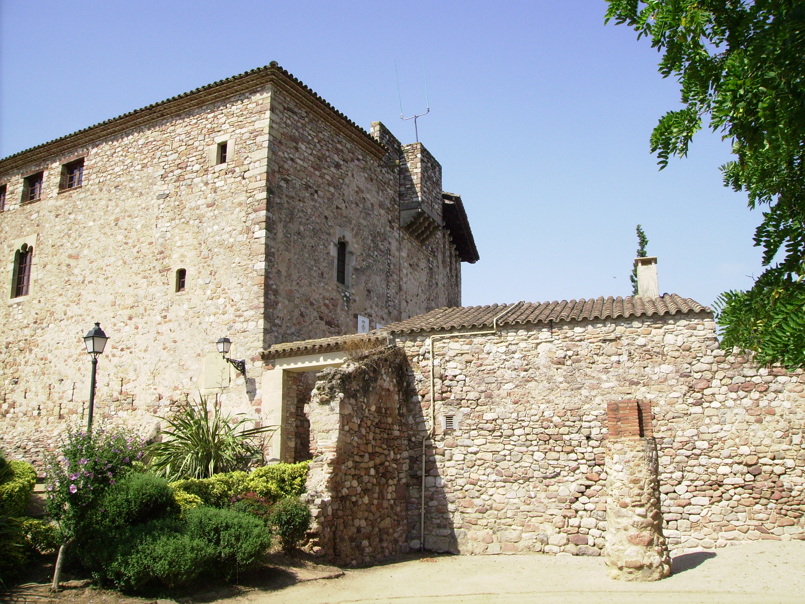 Cara Nord del castell de Plegamans